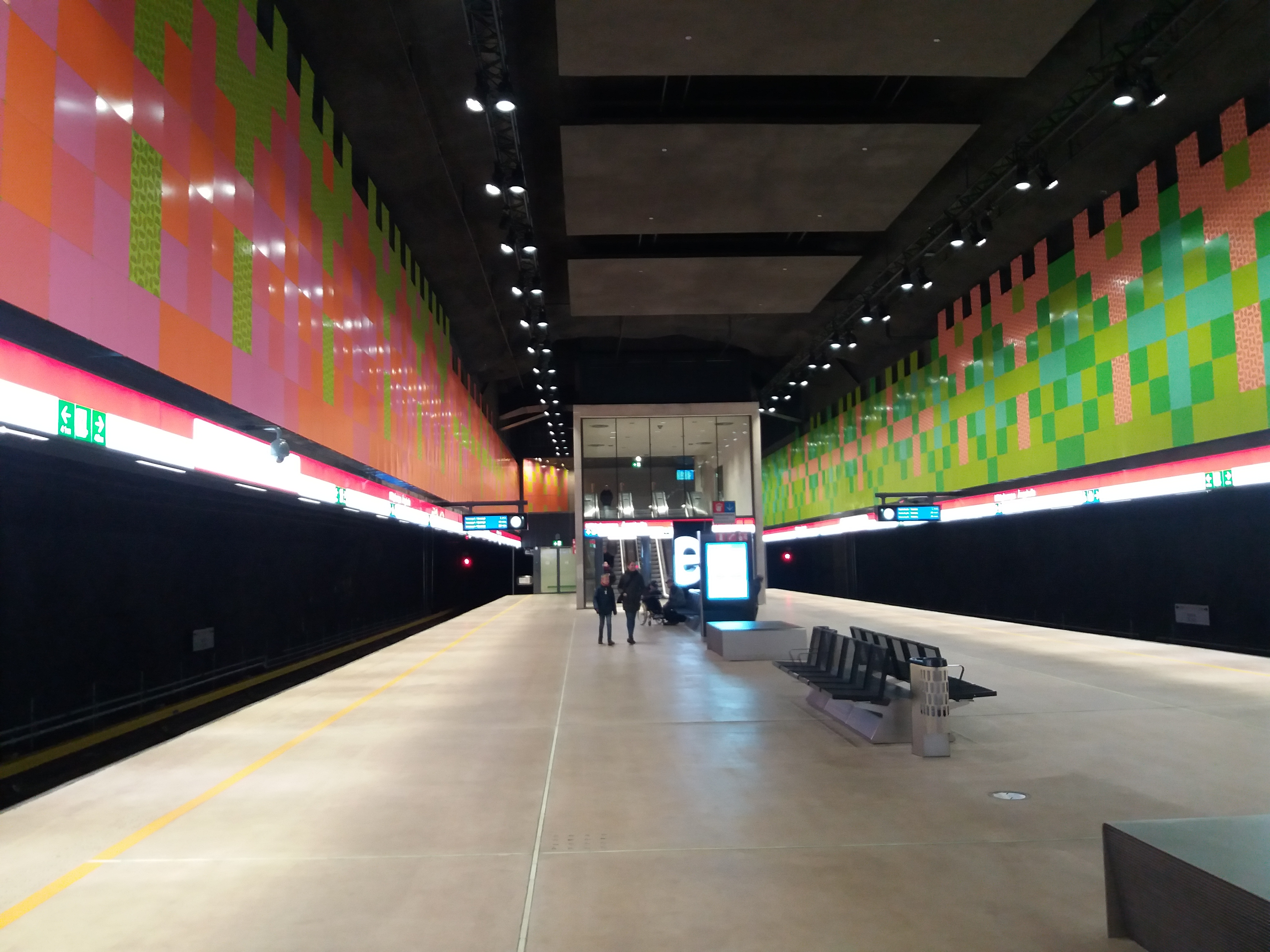 Niittykummun metroaseman laituri avajaisaamunaan.